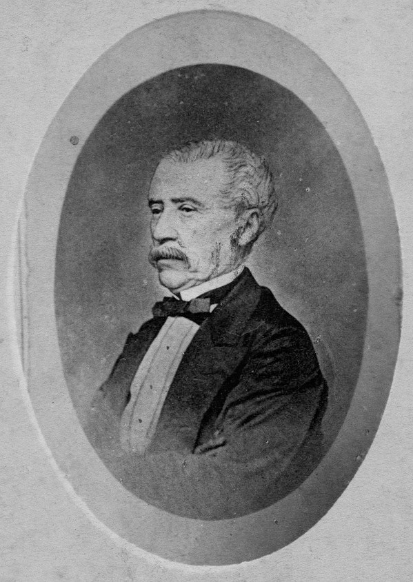 El presidente de la República del Ecuador, Gral. José María Urbina y Viteri, alrededor de 1888.